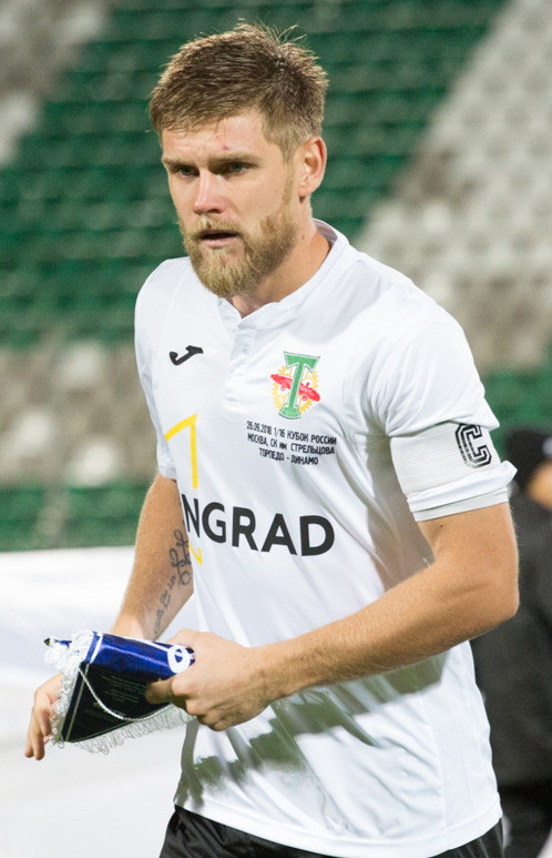 Кубок России: «Динамо» оказалось сильнее «Торпедо» в московском дерби